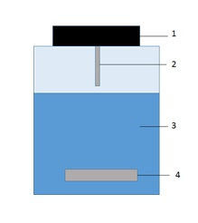 Montage pour HSSE: 1) Bouchon 2) Barreau recouvert de PDMS 3) Échantillon 4) Barreau magnétique